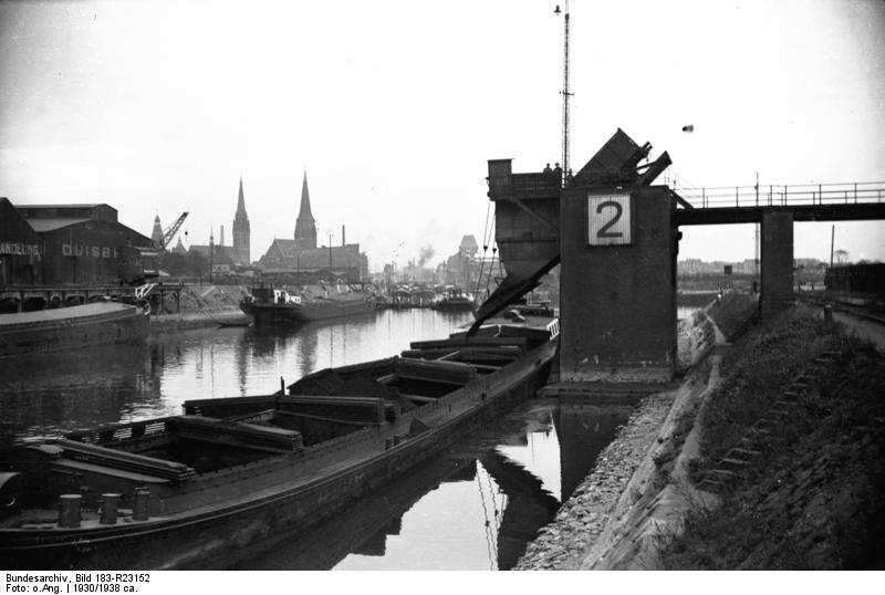 Mülheim, Industriehafen Mülheim - Industriehafen. (vor 1939) Aufn.: Illus